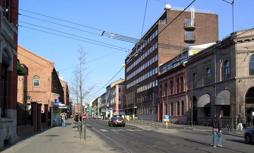 Trondheimsveien, Oslo. Nederste del, sett fra Schous Bryggeri mot Carl Berner.